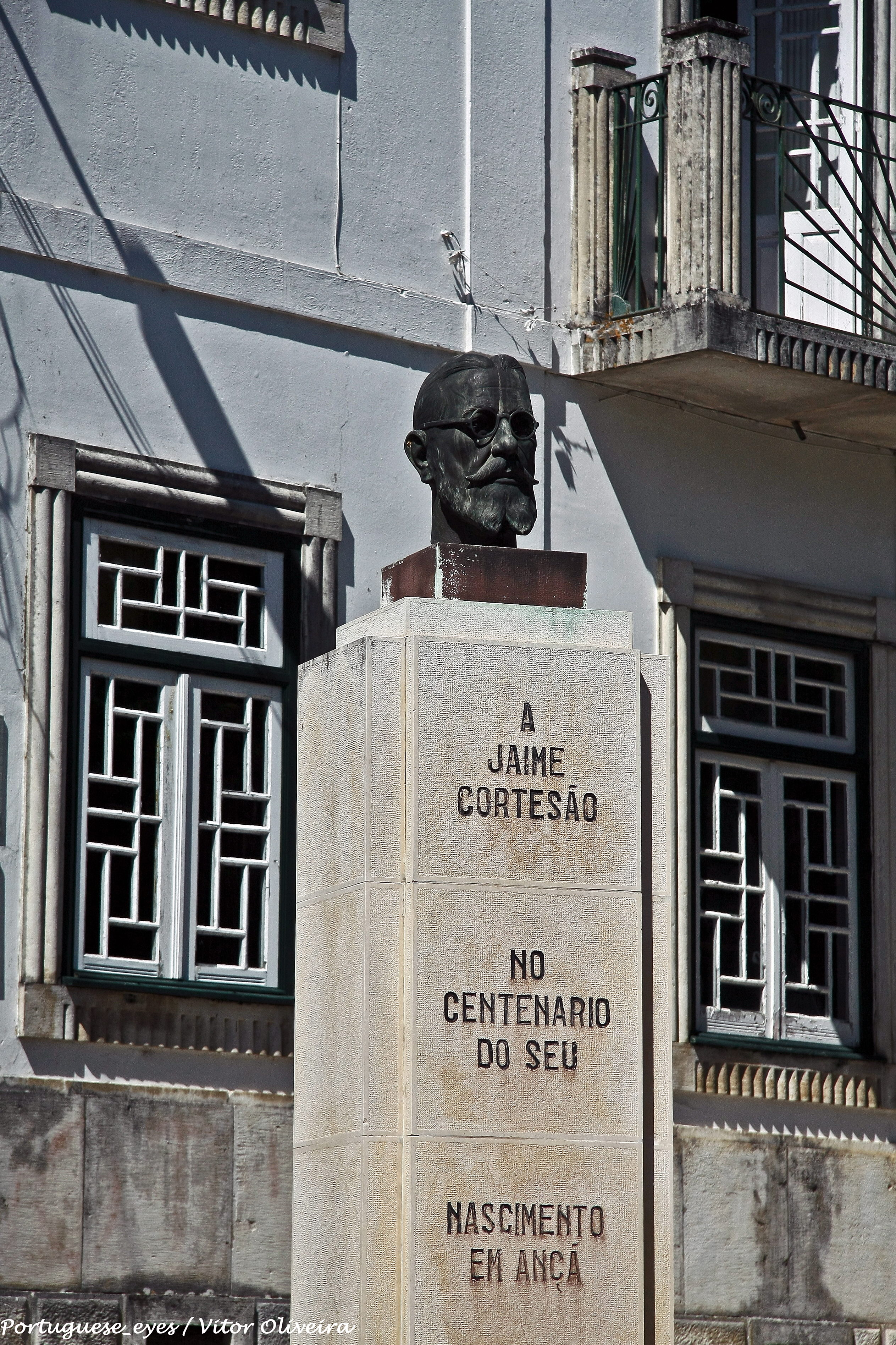 Monumento a Jaime Cortesão - Ançã - Portugal